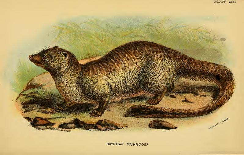 Egyptian Mungoose / Herpestes ichneumon